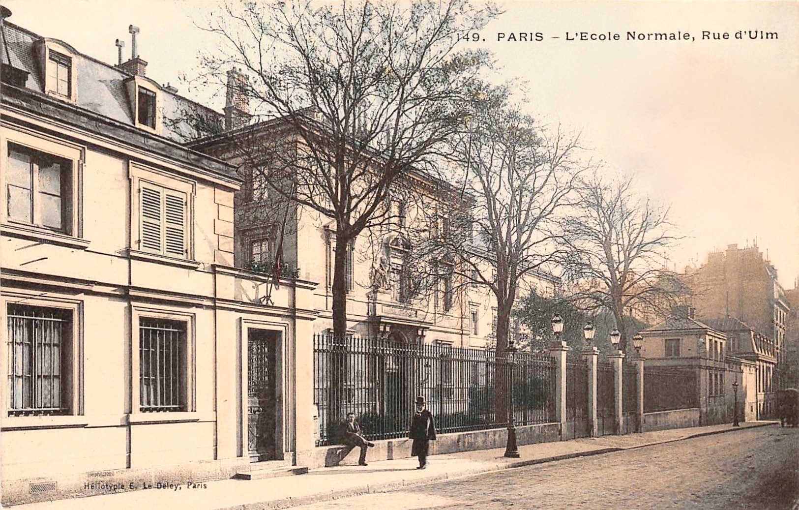 École normale supérieure, rue d'Ulm, Paris, vers 1900